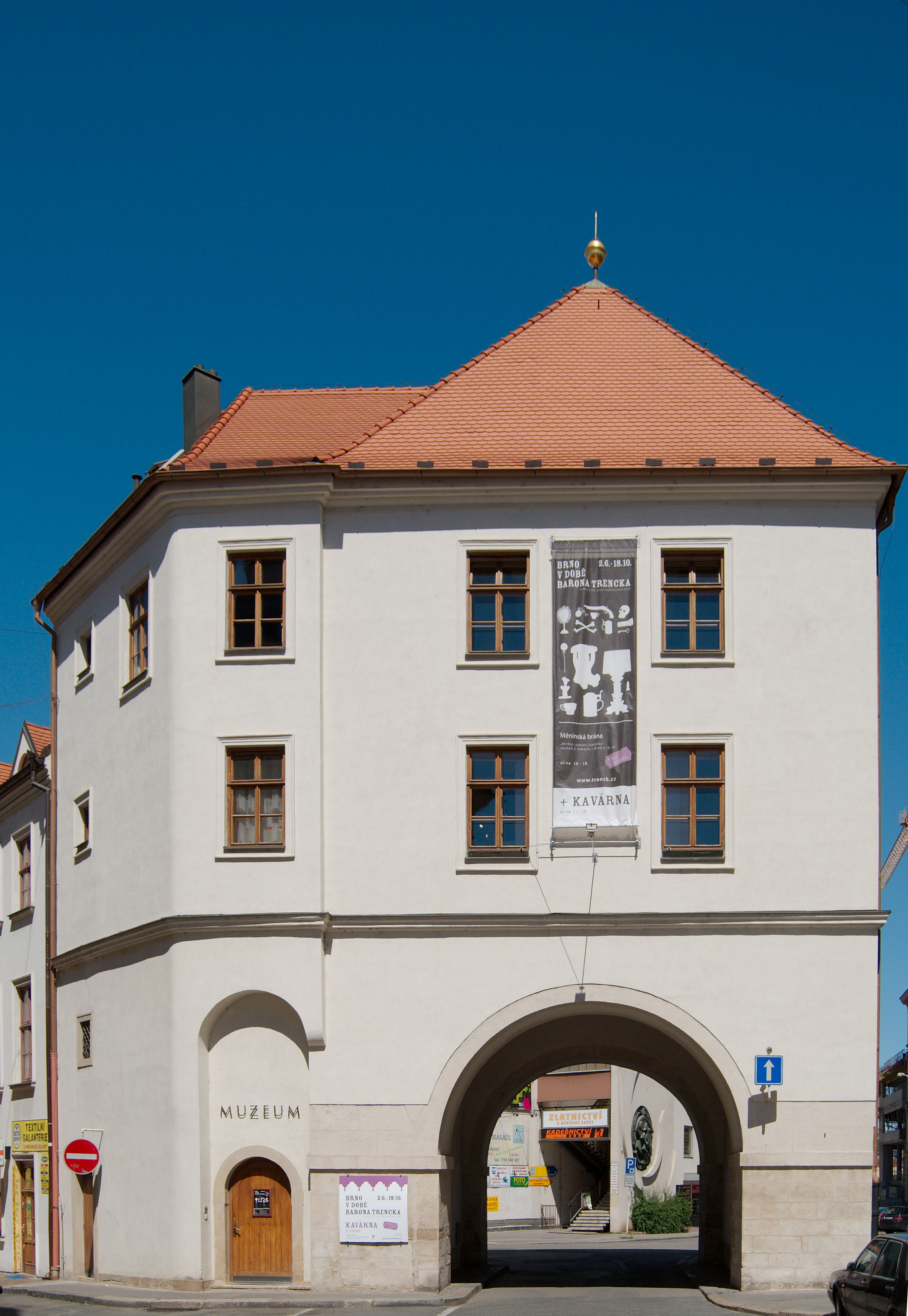 Město Brno - Měnínská brána